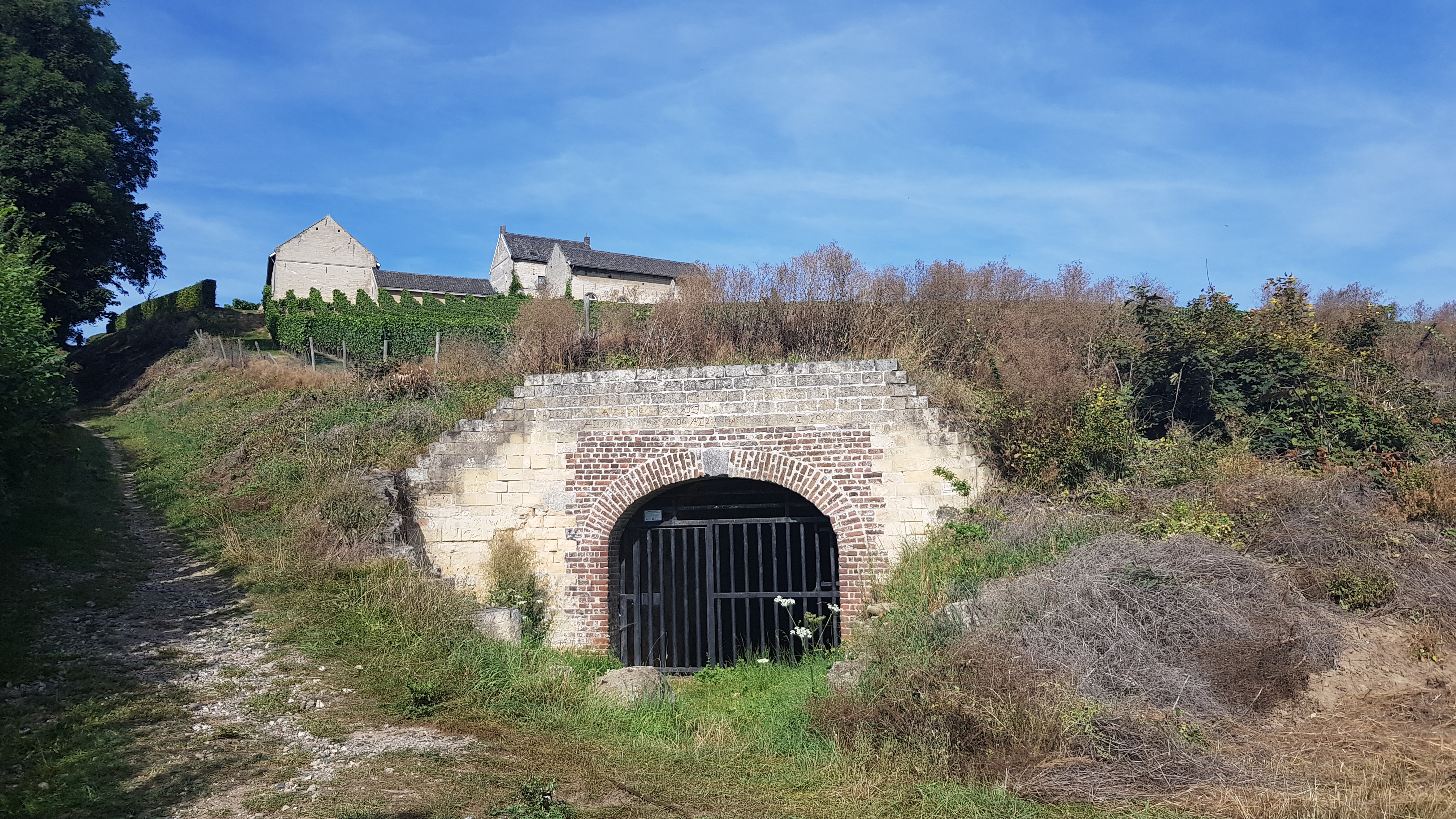 Apostelgroeve, Maastricht, Nederland